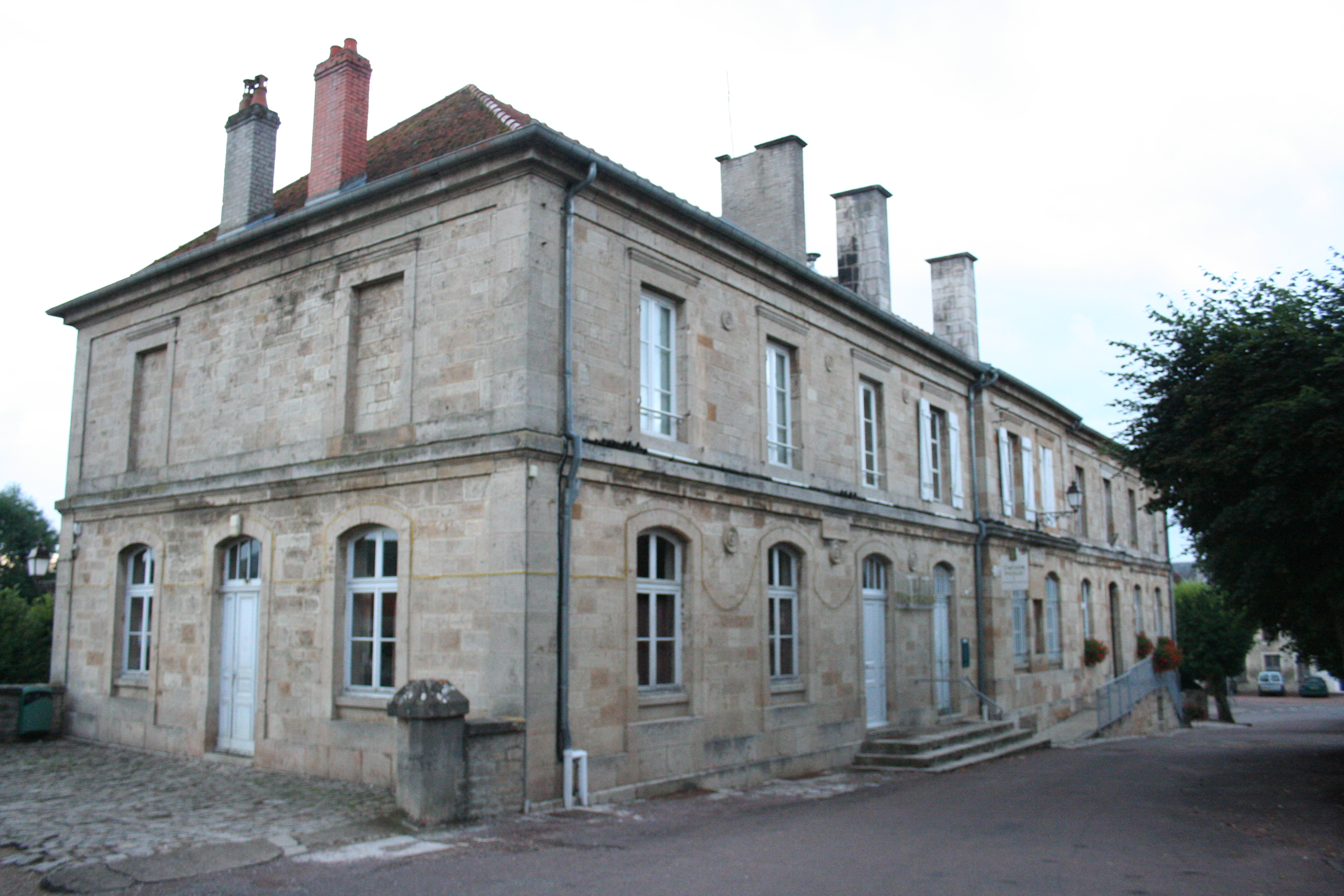 Mairie de Rolampont (France - Haute-Marne)